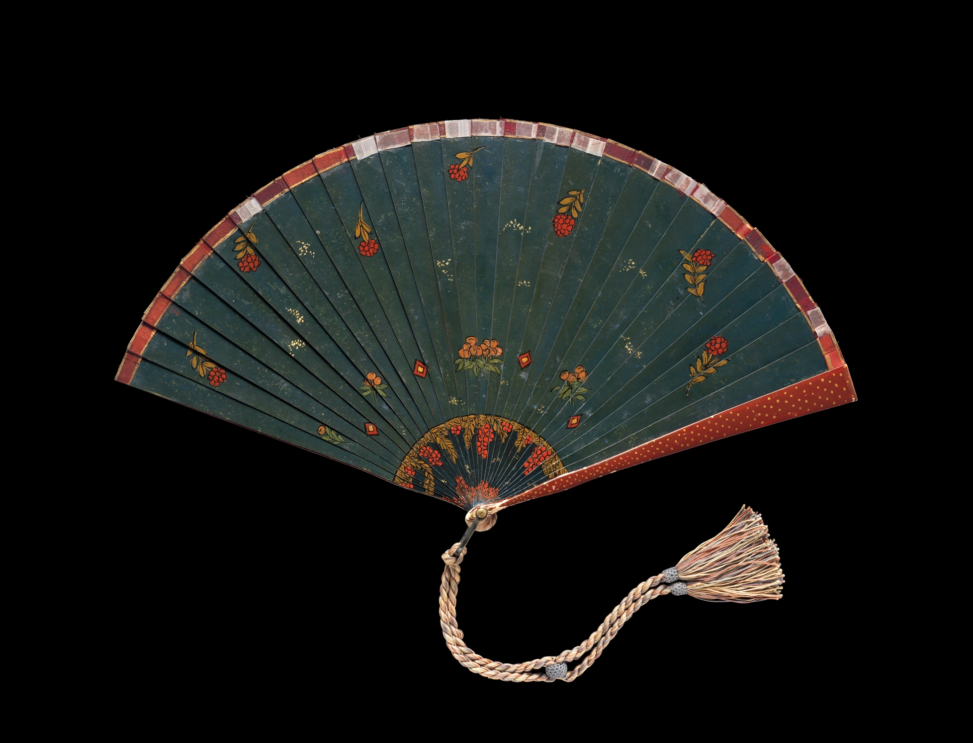 Fan; Fans